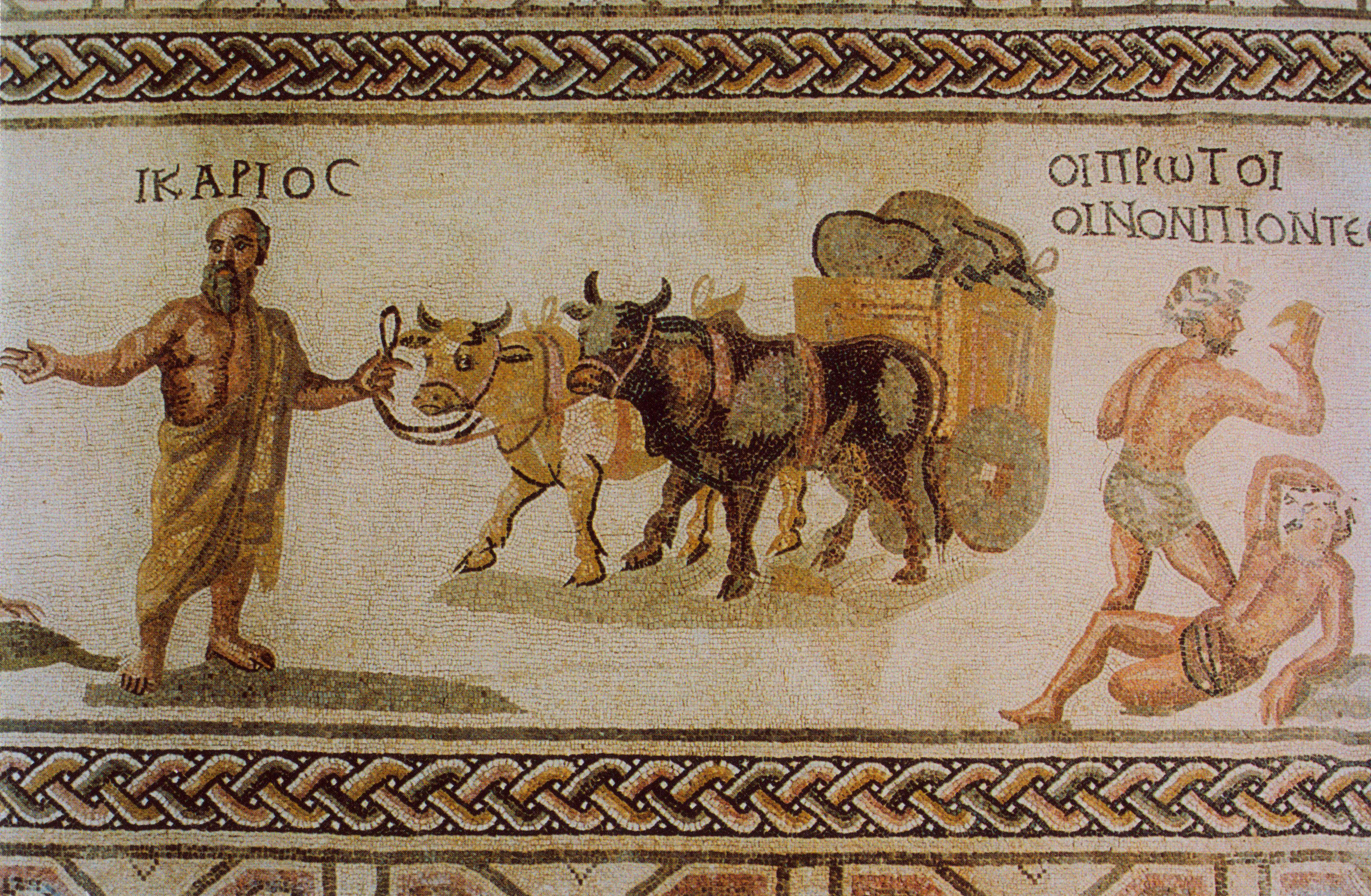 Transport d'outres d'outres de vin par char à boeufs au IIIe siècle